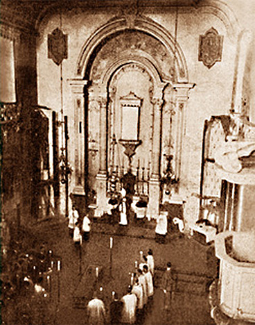 Interior da antiga Matriz da Mãe de Deus de Porto Alegre.